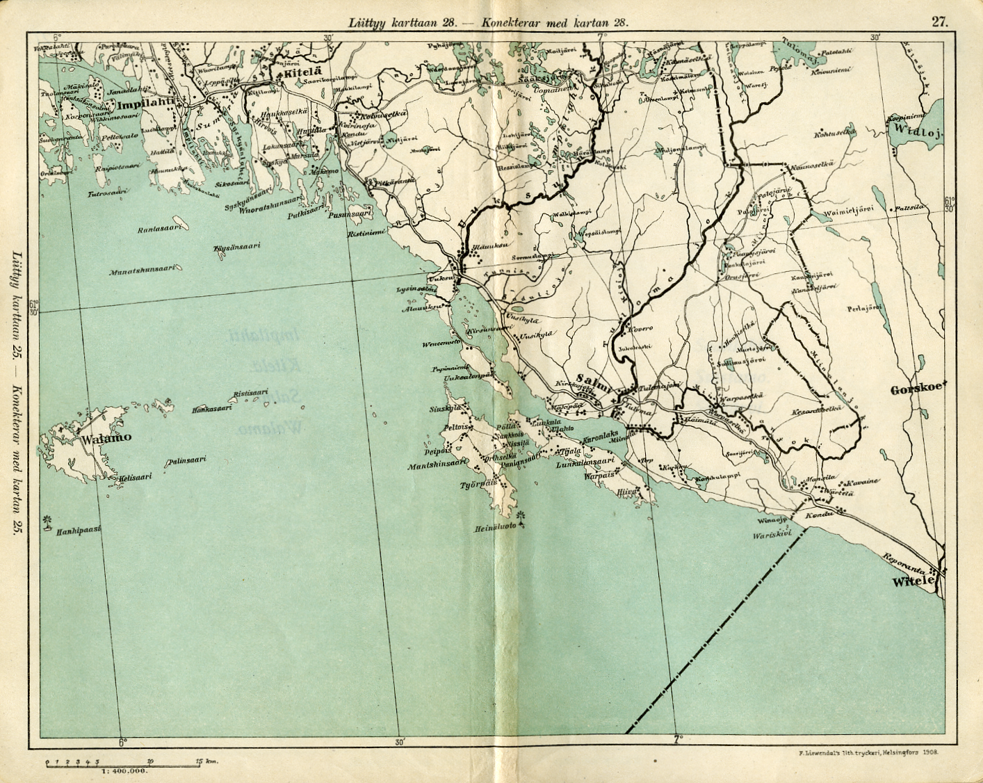 Karta Impilax Kitelä Salmis Valamo 1908